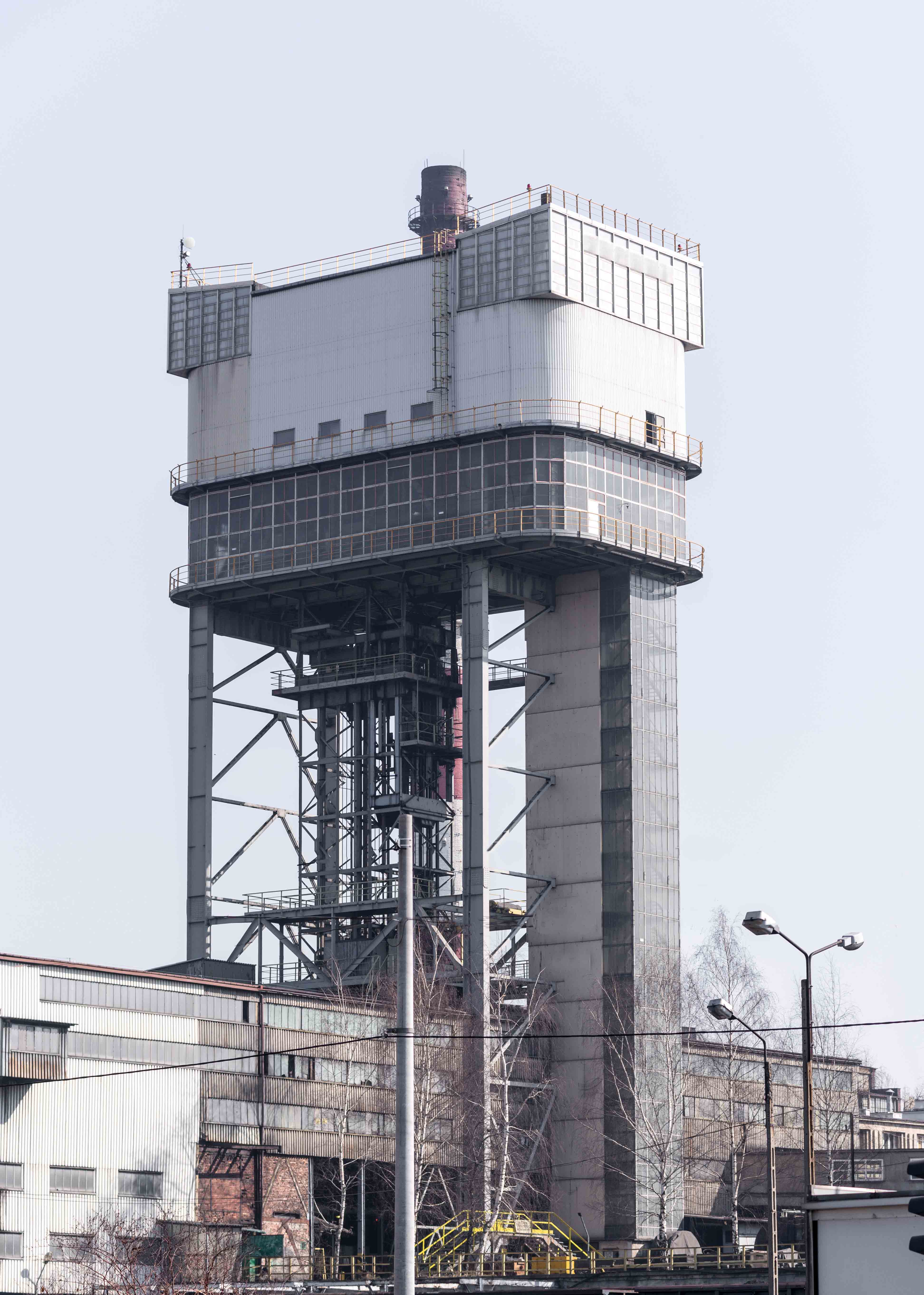 Szyb Lechia KWEK Wujek